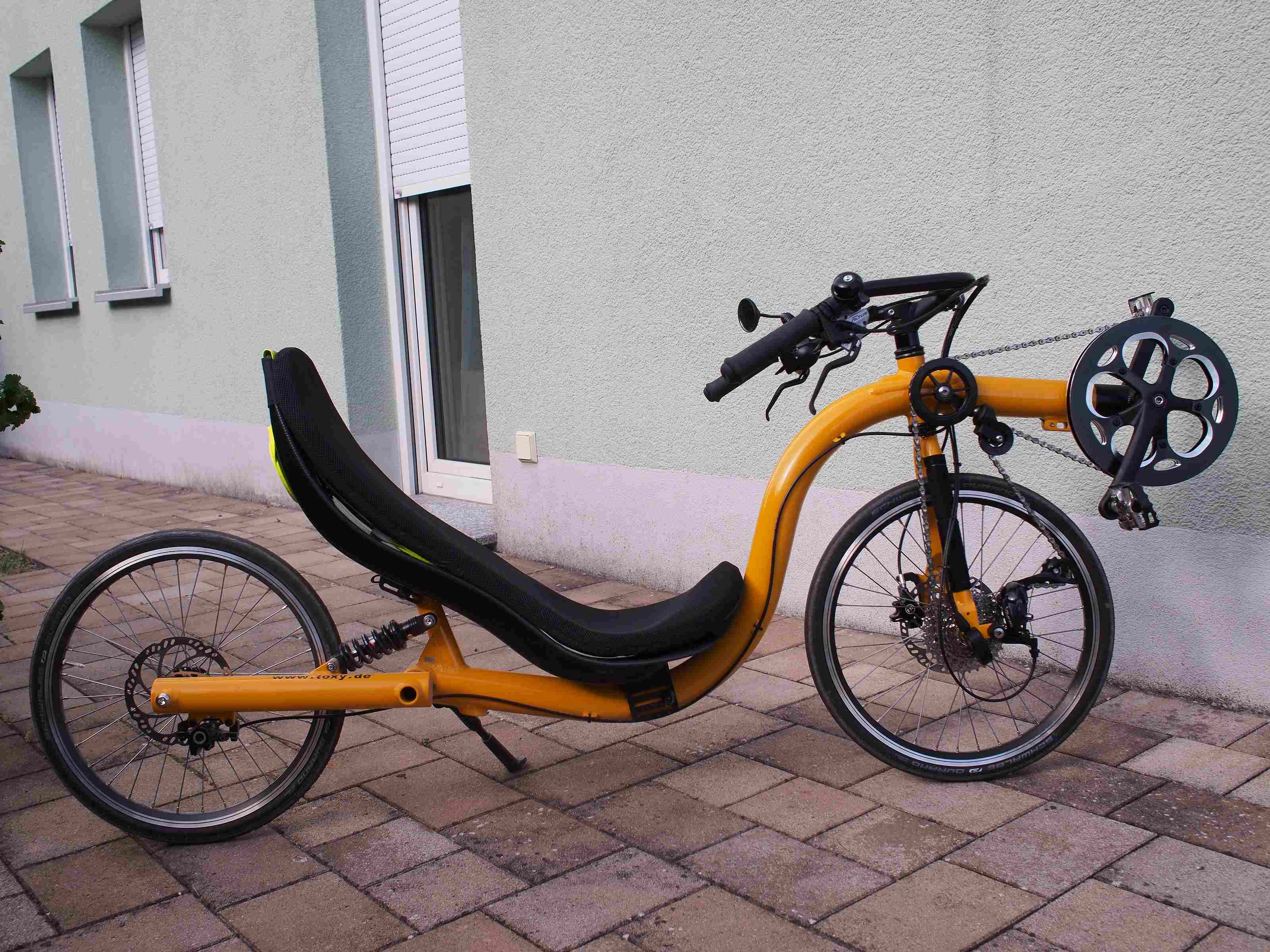 Das Toxy ZR ist einiger der wenigen Tieflieger mit Frontantrieb und wohl das einzige mit gleichzeitiger gefederter Einarmschwinge. Sitzhöhe etwa 0,20m.